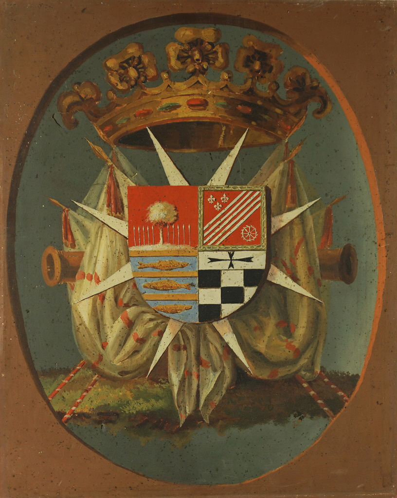 Bekrönte Wappentrophäe, hinterfangen von Fahnen und Kanonen. Öl/Lwd. 52,5 x 42,5 cm. Provenienz: Sammlung Werner-Konrad Jaggi, Zürich